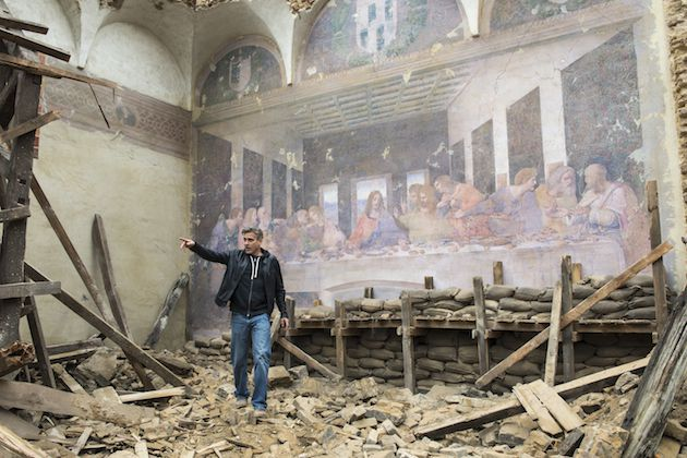 Српски (ћирилица): Тајна вечера након бомбардовања 1943. година